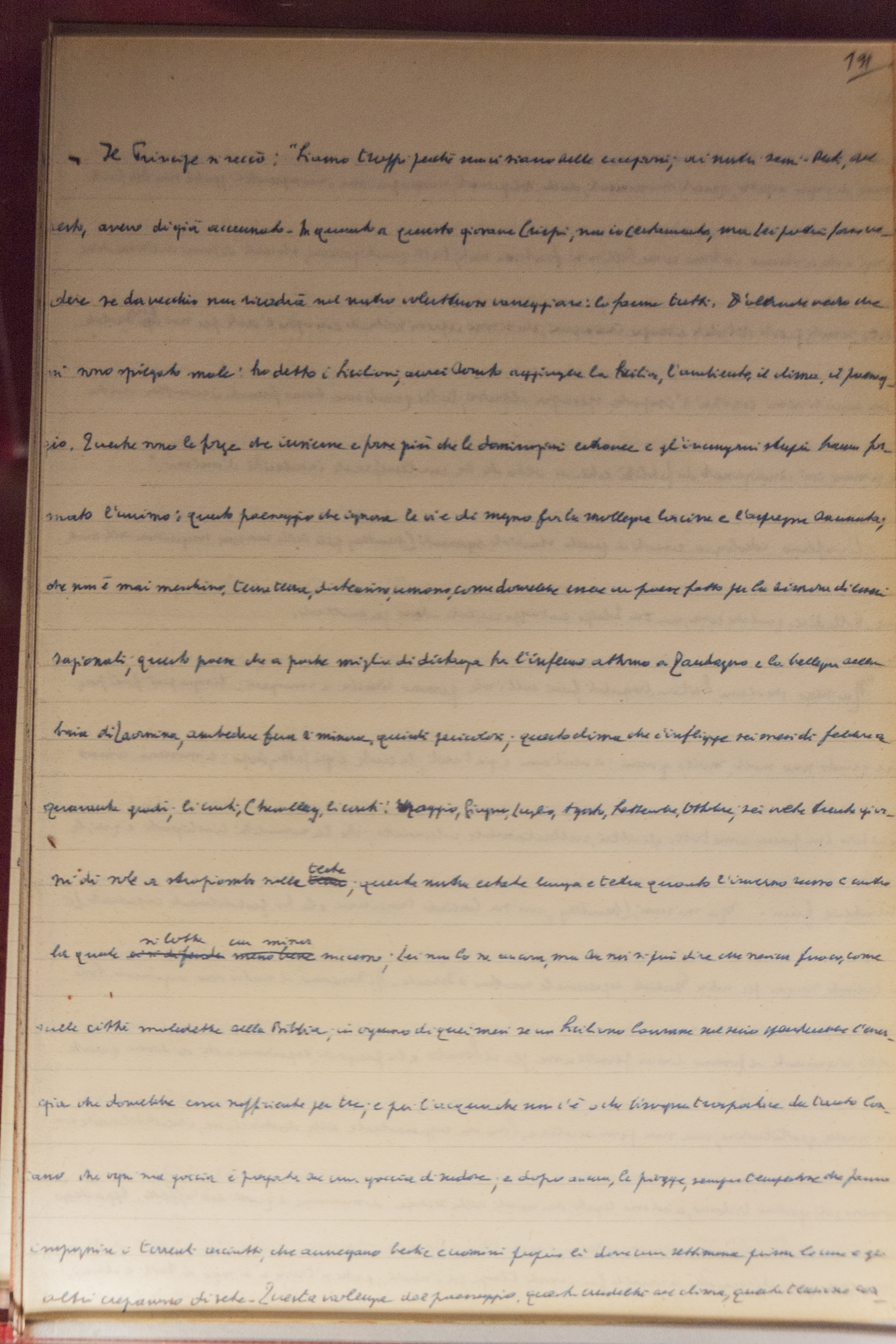 Manoscritto Gattopardo